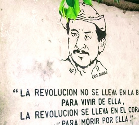 Mural del Comandante guerillero Dimas Rodríguez